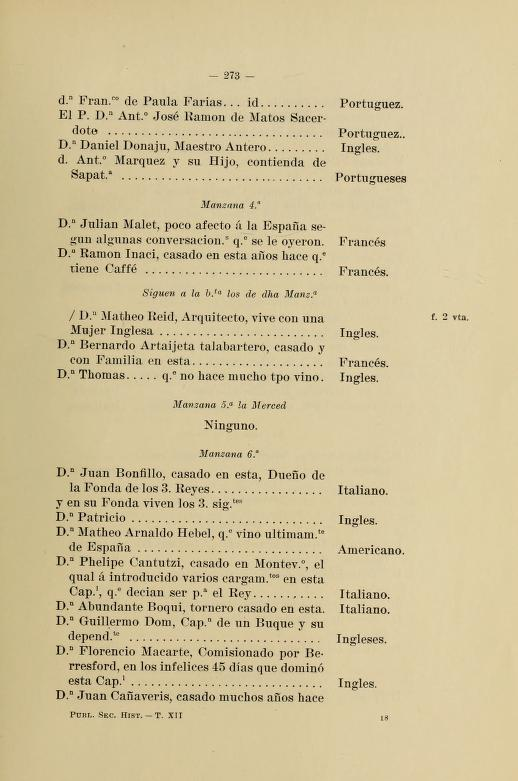 padrón de extranjeros del año 1809, Juan Cañaveris (Canaveris)